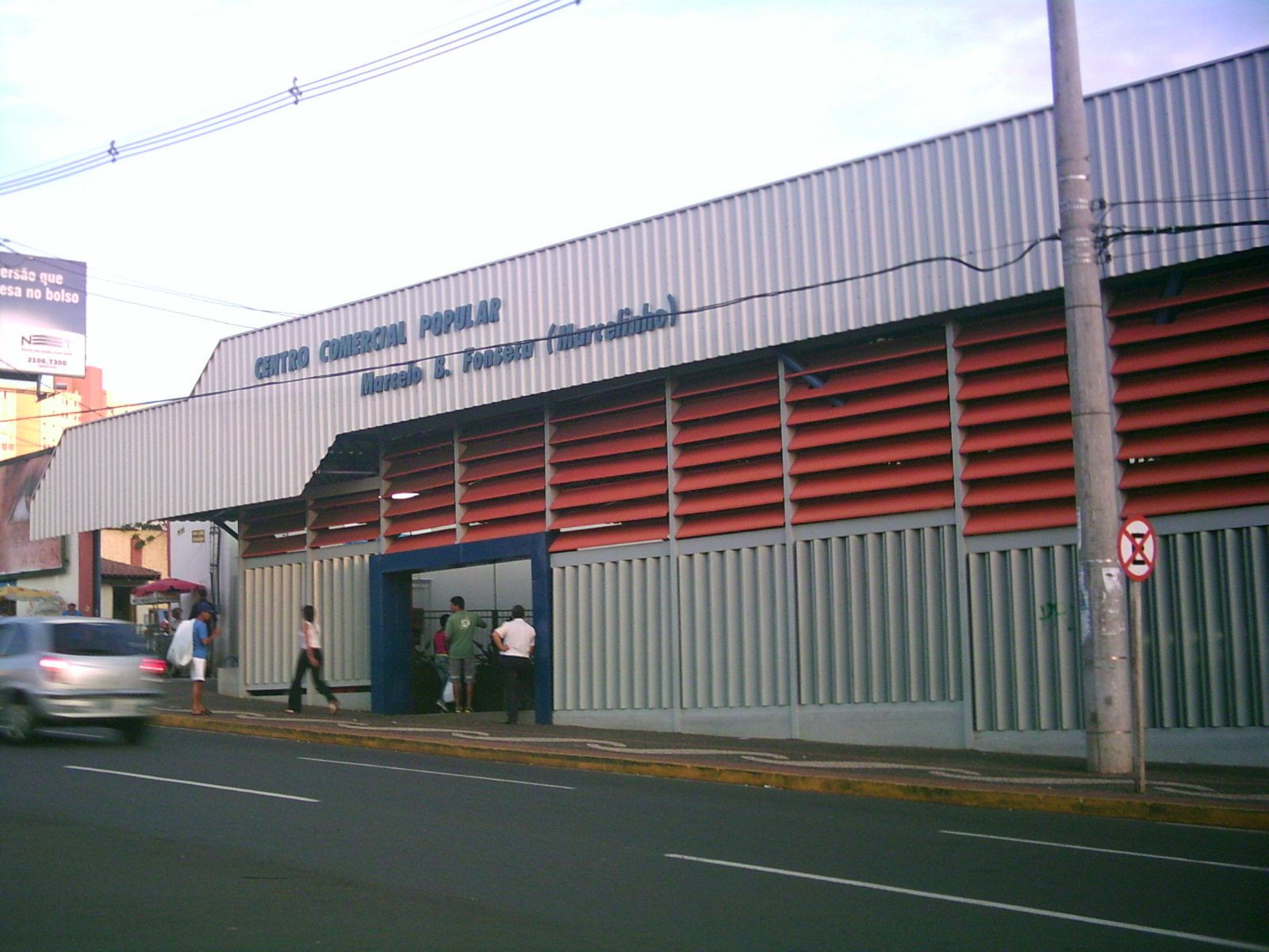 Foto do Camelódromo - Campo Grande